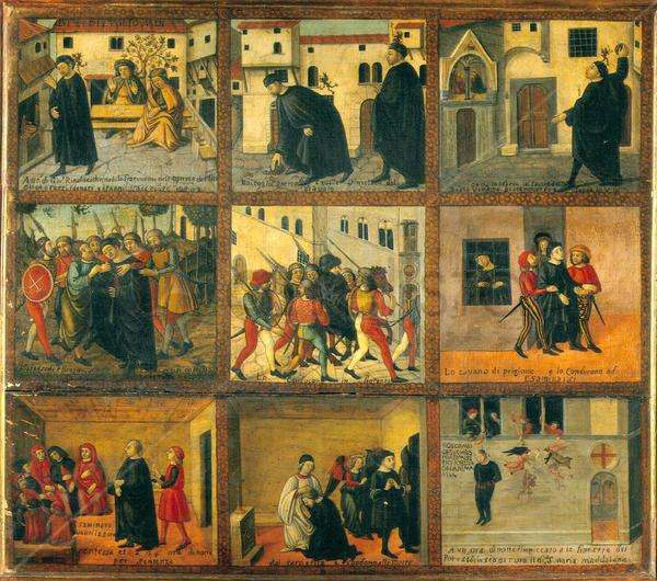 Palazzo del Paciarelli, piazza della Repubblica, Firenze.